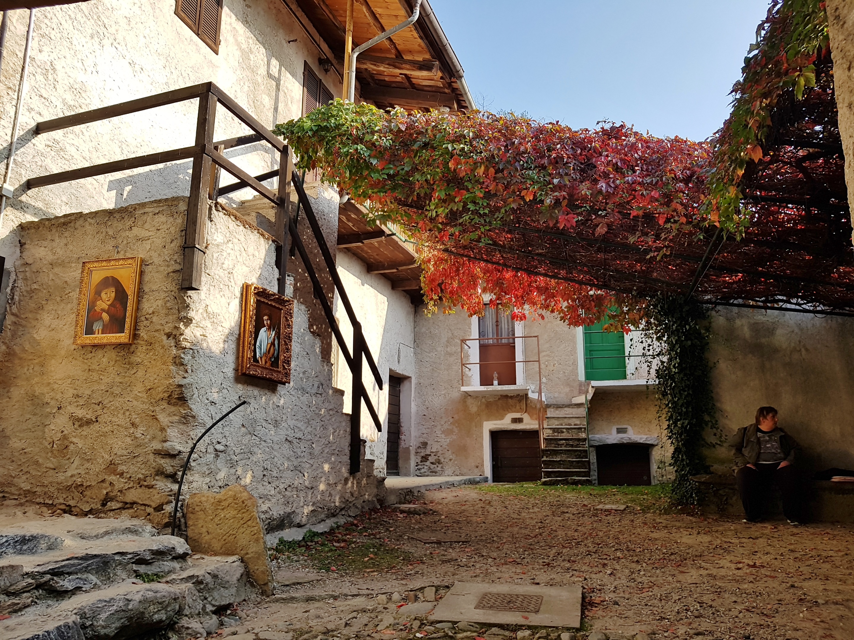 Balmetti, Borgofranco d'Ivrea, Piemonte